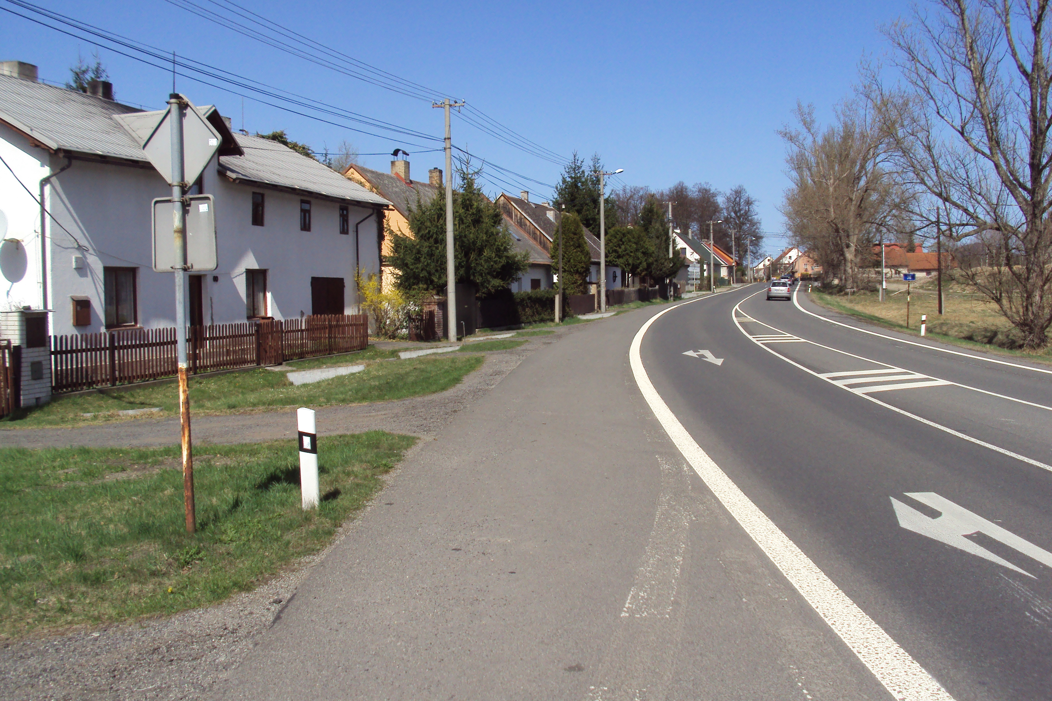 Obec Obora u Doks, průchozí silnice 38